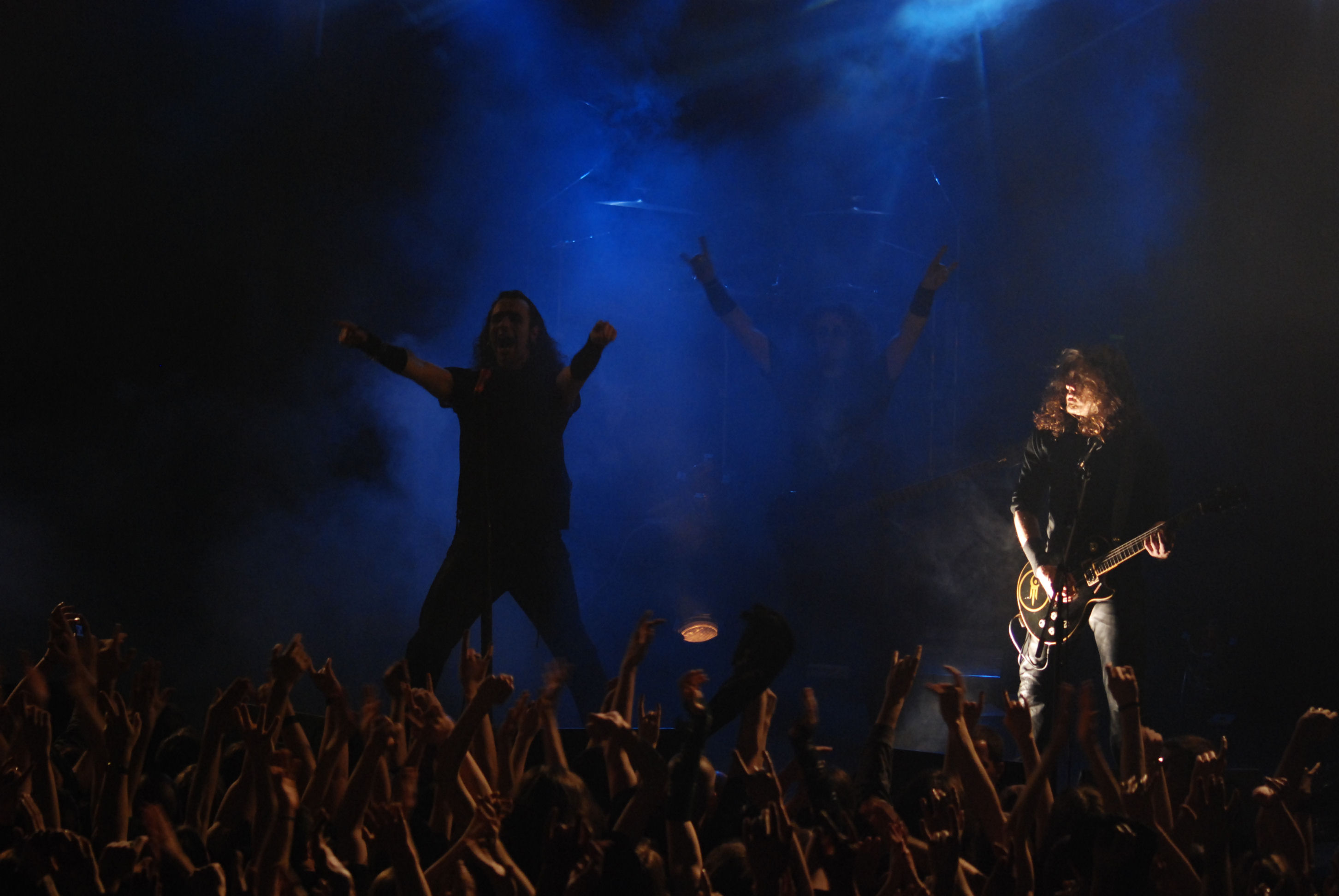 Koncert Moonspell'a w klubie Studio w Krakowie